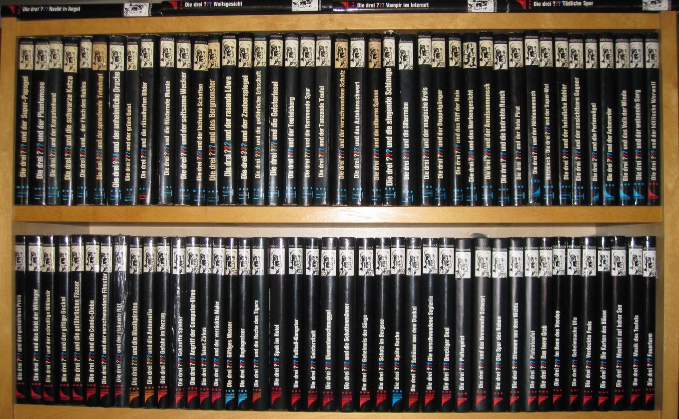 Buchrücken von 89 Büchern der Serie "Die drei ???" von Kosmos. Bei diesen Büchern handelt es sich um Erstauflagen, die der Kosmos Verlag Aiga Rasch, der Cover-Illustratorin der Bücher, als Belegexemplar zugeschickt hat. Aiga Rasch illustrierte Drei-???-Bücher für Kosmos von 1970 bis 1999.